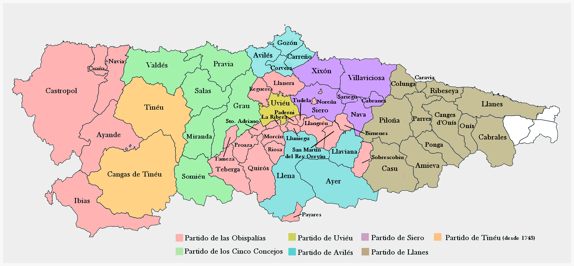 Principado de Asturias. Antigüo régimen. Concejos con Procurador en la Junta General del Principado y Partidos para el nombramiento de Diputado